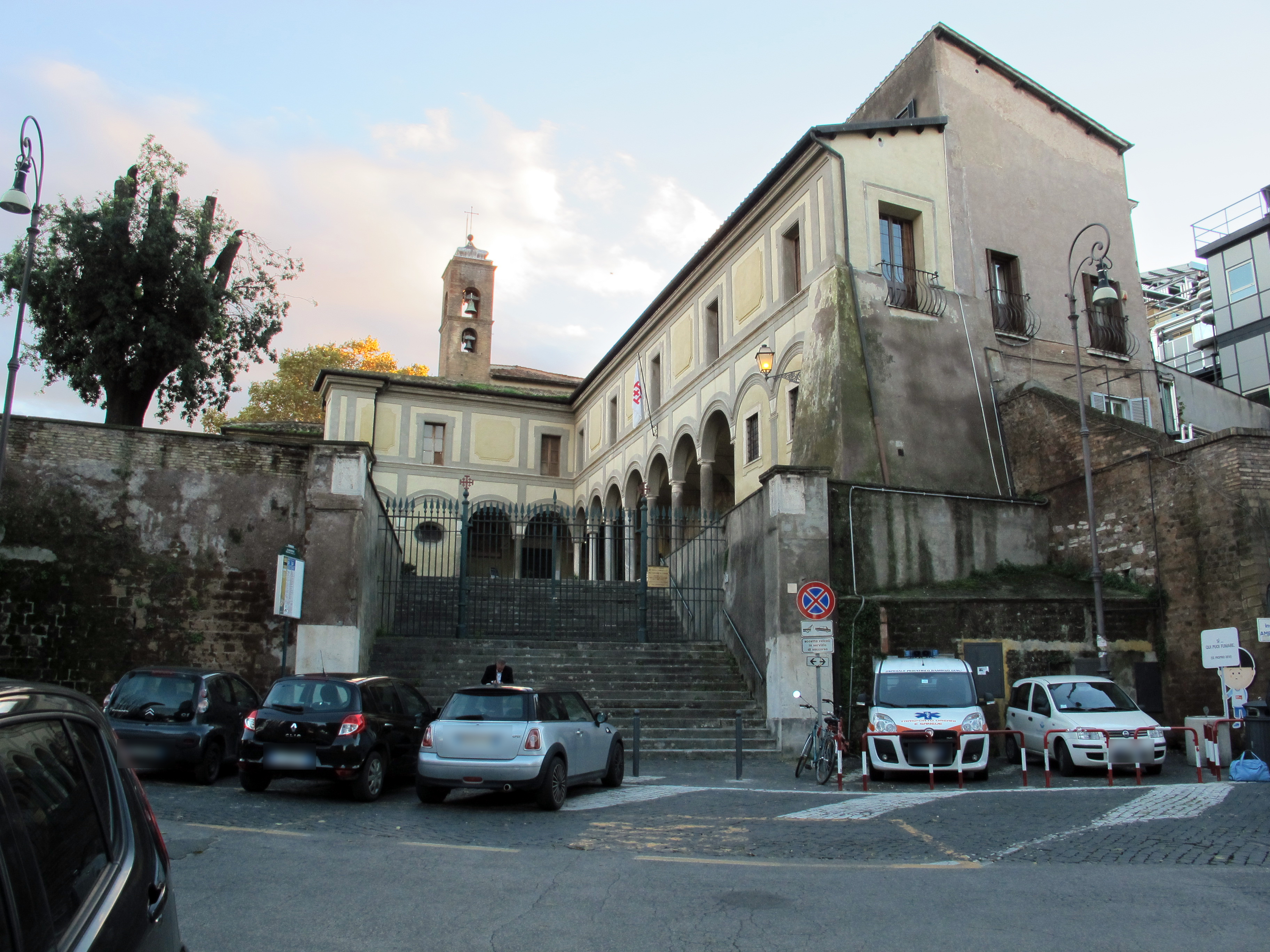 Roma, vedi titolo